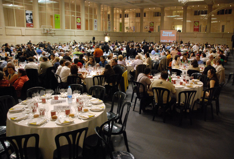 Sopar d'Esquerra Unida i Alternativa, nit del 29 al 30 de setembre de 2007, a INEFC Barcelona